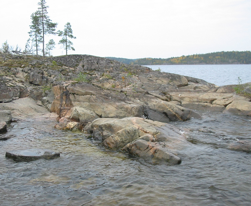 Laadoga põhjakaldal Sorola saarel. Saar ja kogu Laadoga põhjaosa asuvad Fennoskandia (Balti) kilbi avamusalal, kus paljanduvad Proterosoikumi kristalsed kivimid. Pildil olevad kivimid on migmatiidid ja granitoidsed pegmatiidid.